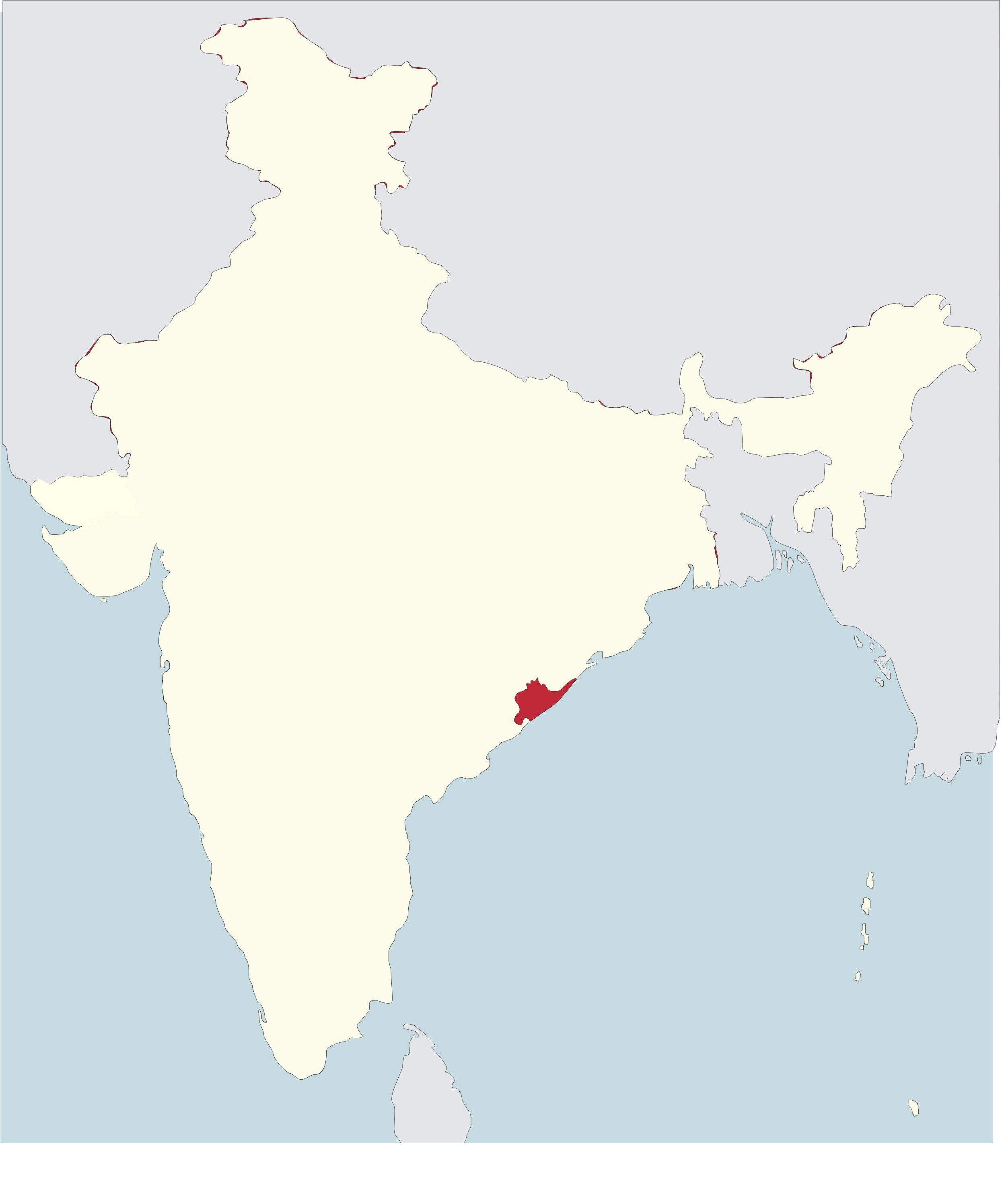 mapa del bisbat de Srikakulam a l'Índia